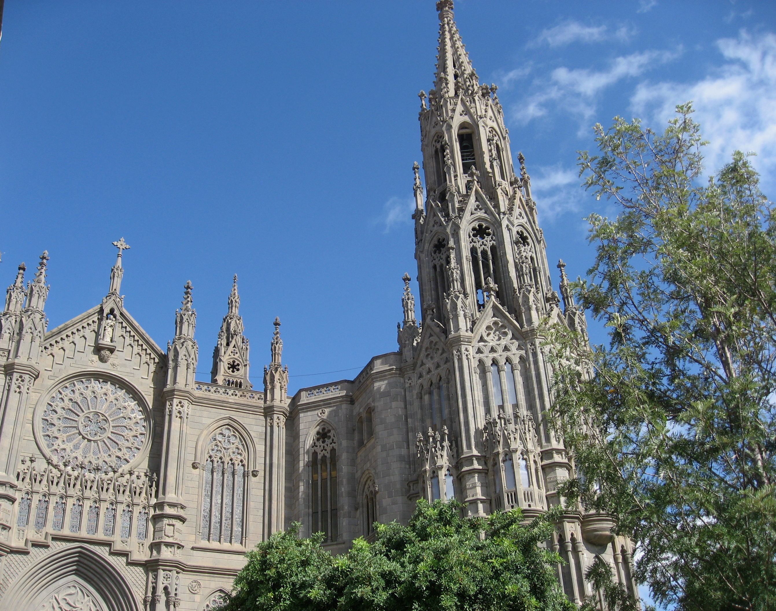 Iglesia de San Juan Bautista. En estilo neogótico es conocida popularmente como la "Catedral de Arucas"